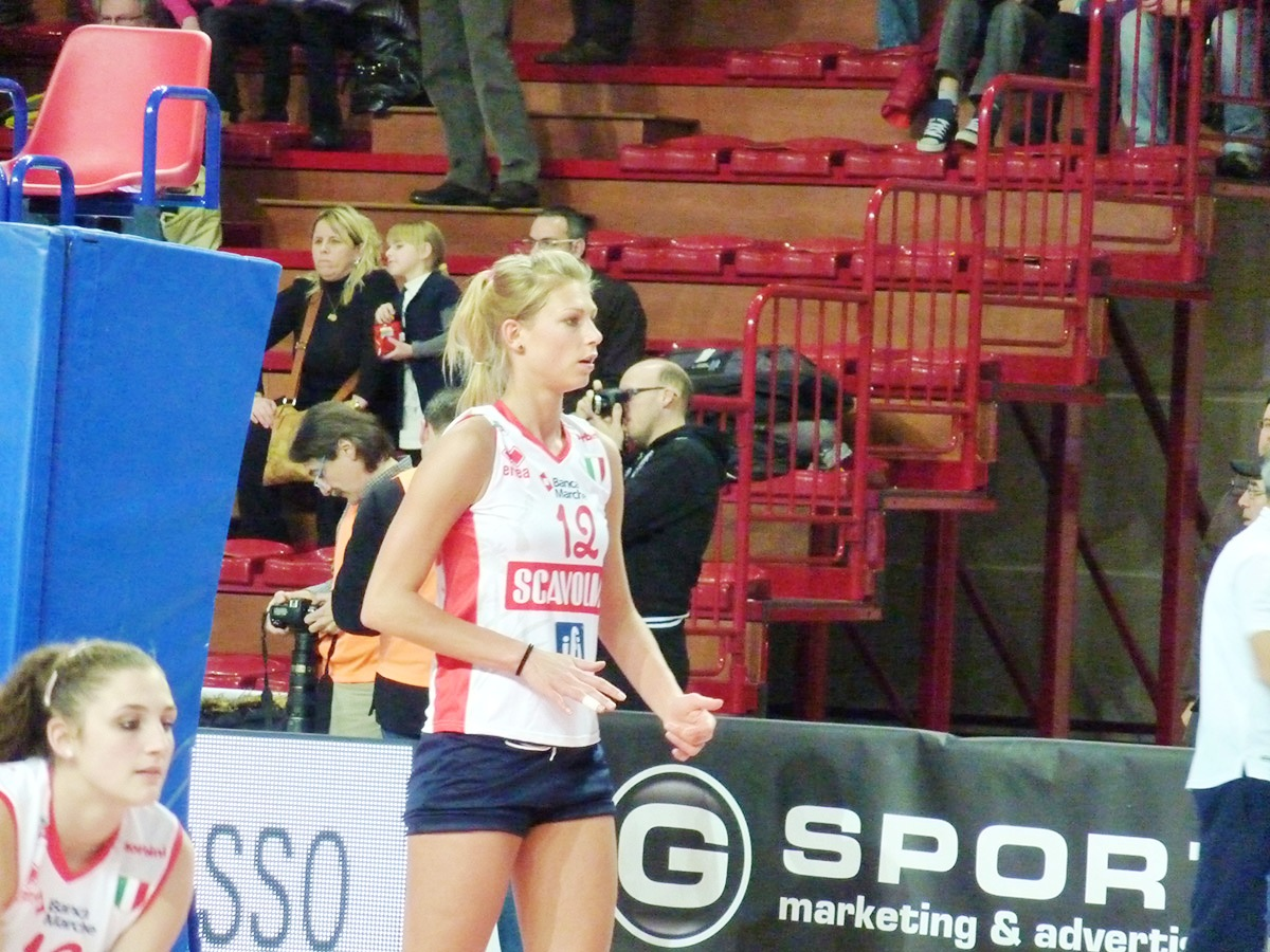 Manon Flier, pallavolista neerlandese, gioca nel ruolo di schiacciatrice ed opposto